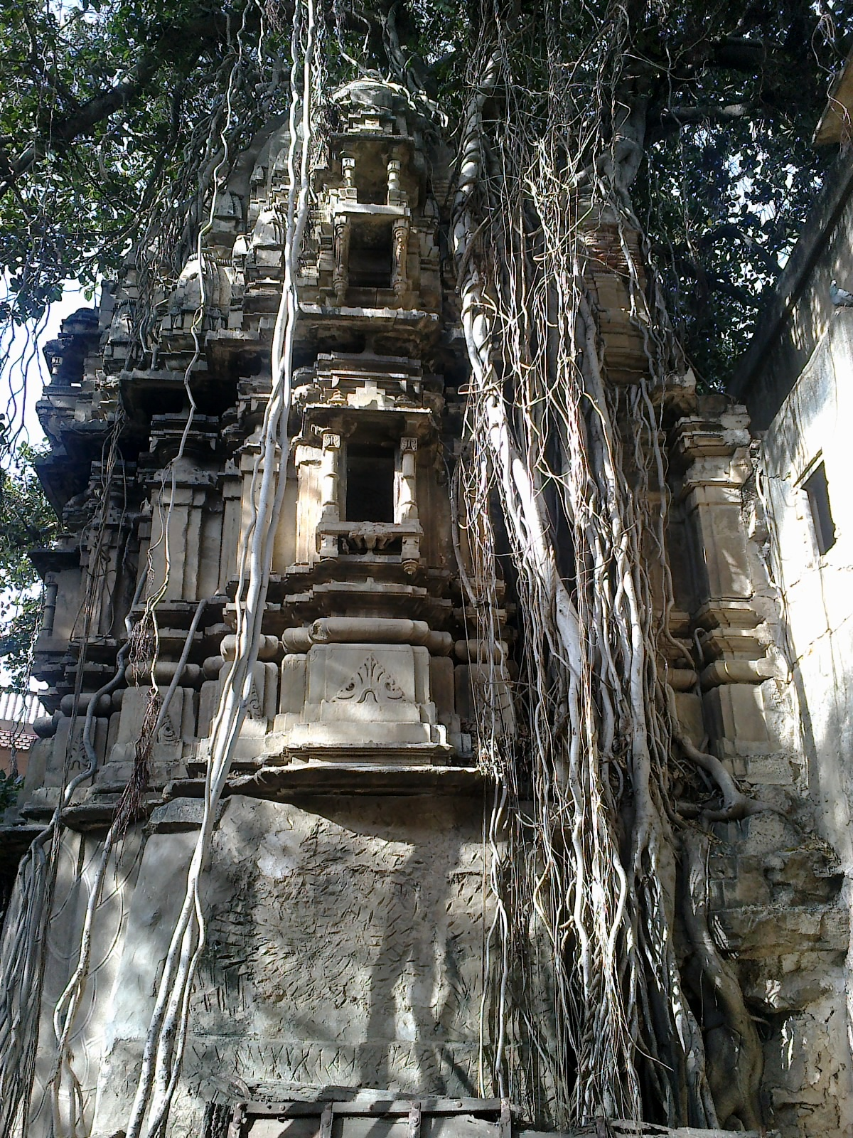 Inde rajasthan Nimaaj Temple Hindou IX Siecle